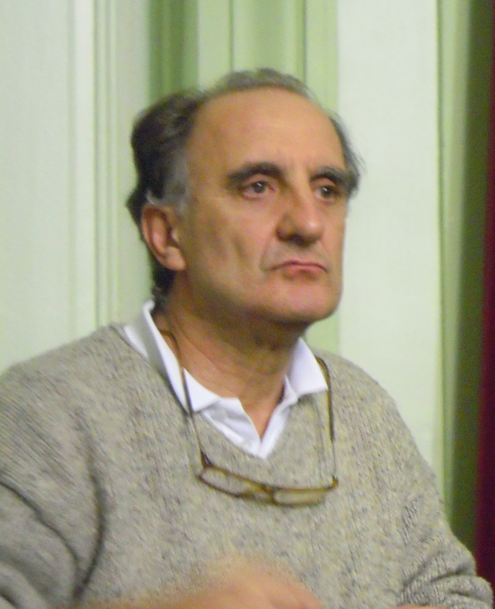 Xaime Toxo, presidente do Ateneo de Pontevedra, na presentación da novela Os elefantes de Sokúrov de Antón Riveiro Coello no IES Valle Inclán